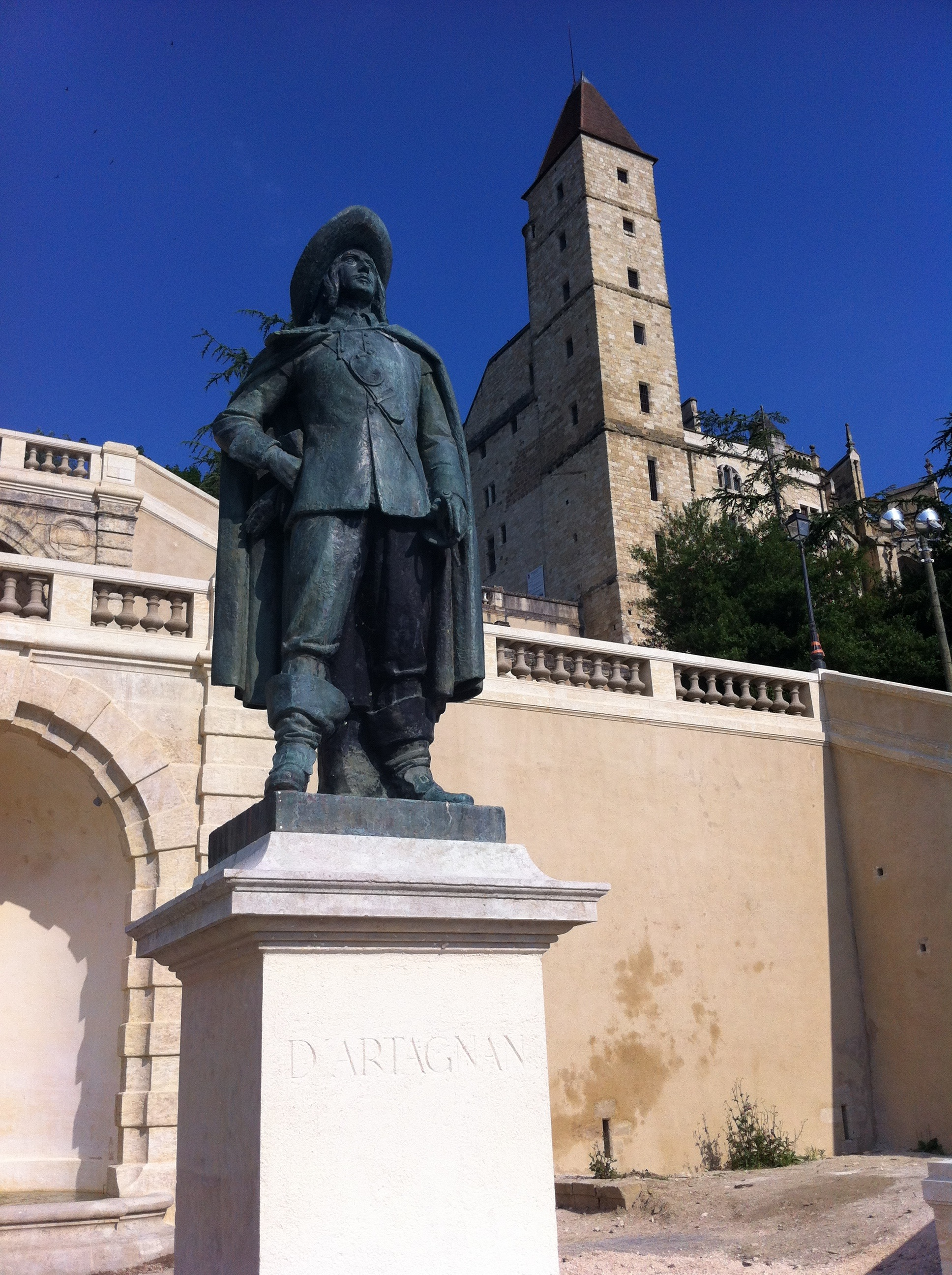 La statue de d'Artagnan (Michelet 1931) sur l'escalier monumental d'Auch (Gers, France) et vue sur la Tour d'Armagnac